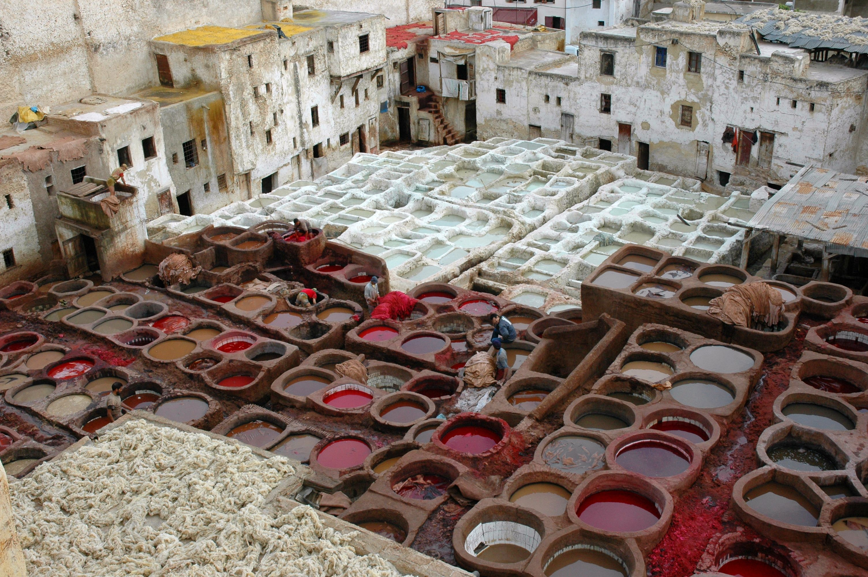 Fes - Adoberies